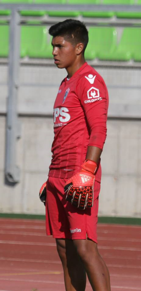 Fotografía del jugador de fútbol Christian Fuentes en el Santiago Wanderers.